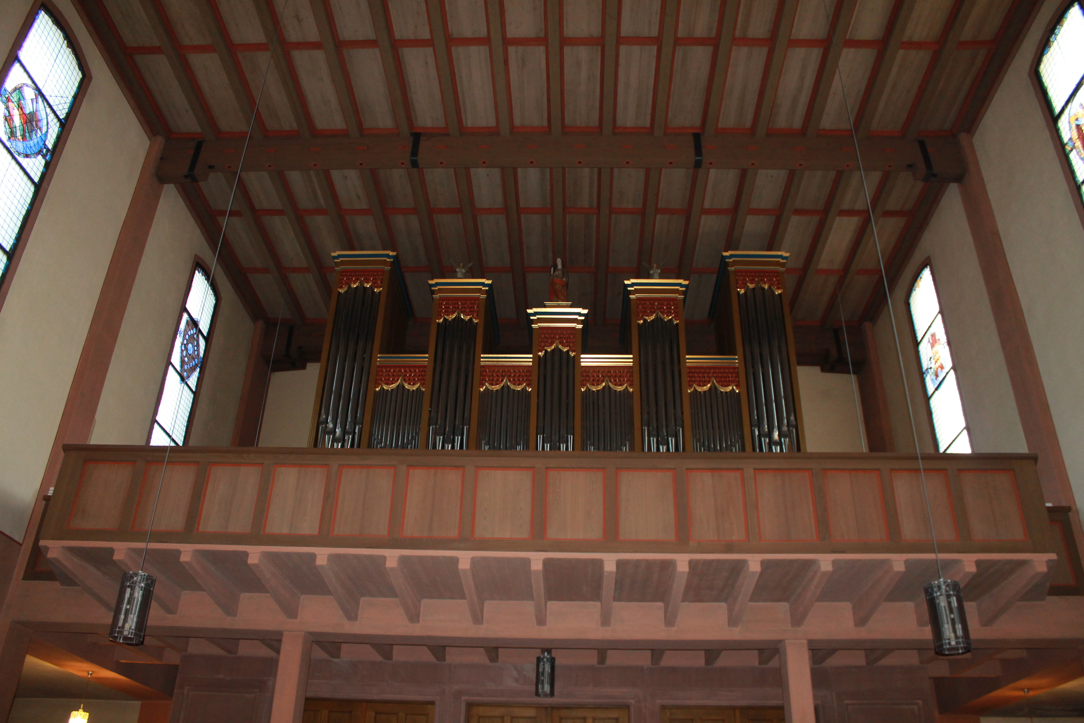 St. Martin Külsheim